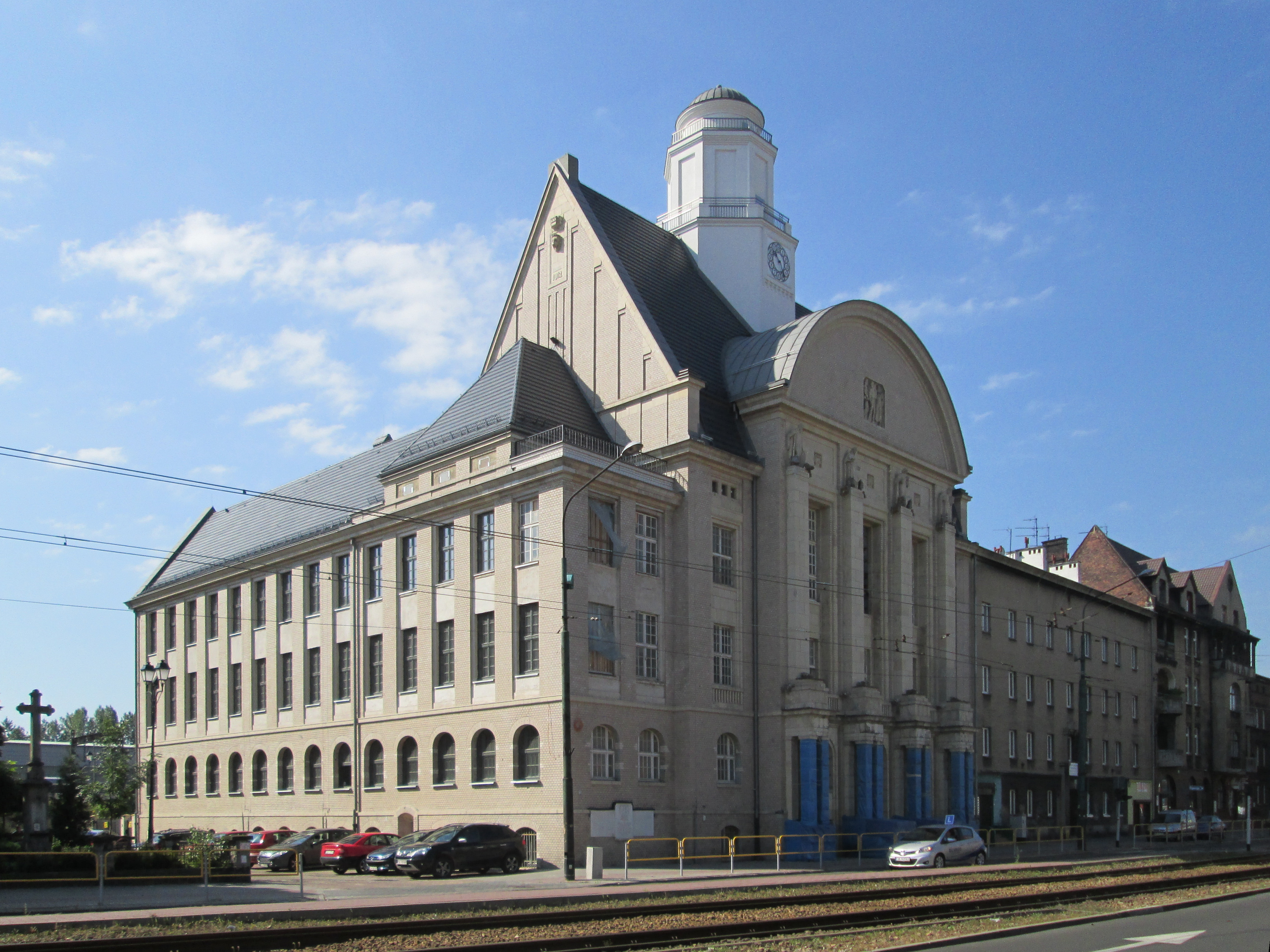 Katowice, ratusz, ob. rektorat Akademii Ekonomicznej